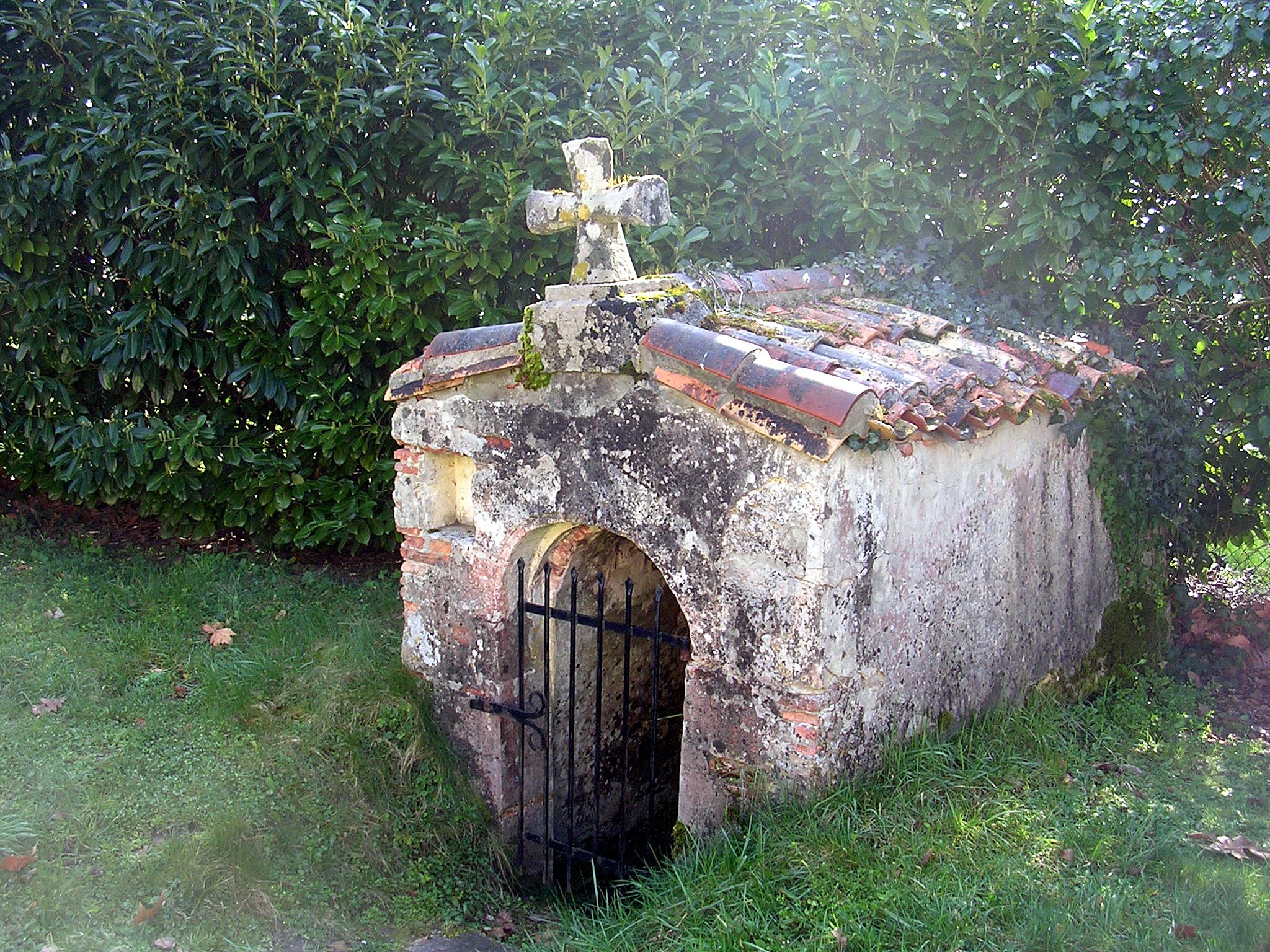 Fontaine Sainte Ruffine, derrière l'église Saint-Pierre-ès-Liens de Biganon